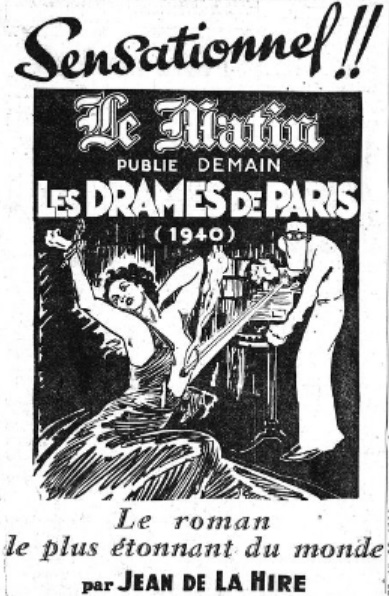 Encart publicitaire annonçant la prochaine parution du roman-feuilleton Les Drames de Paris en première page du quotidien Le Matin du 27/01/1941.